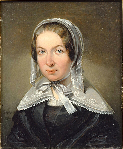 Portrait of Fredrika Bremer (1801-1865).